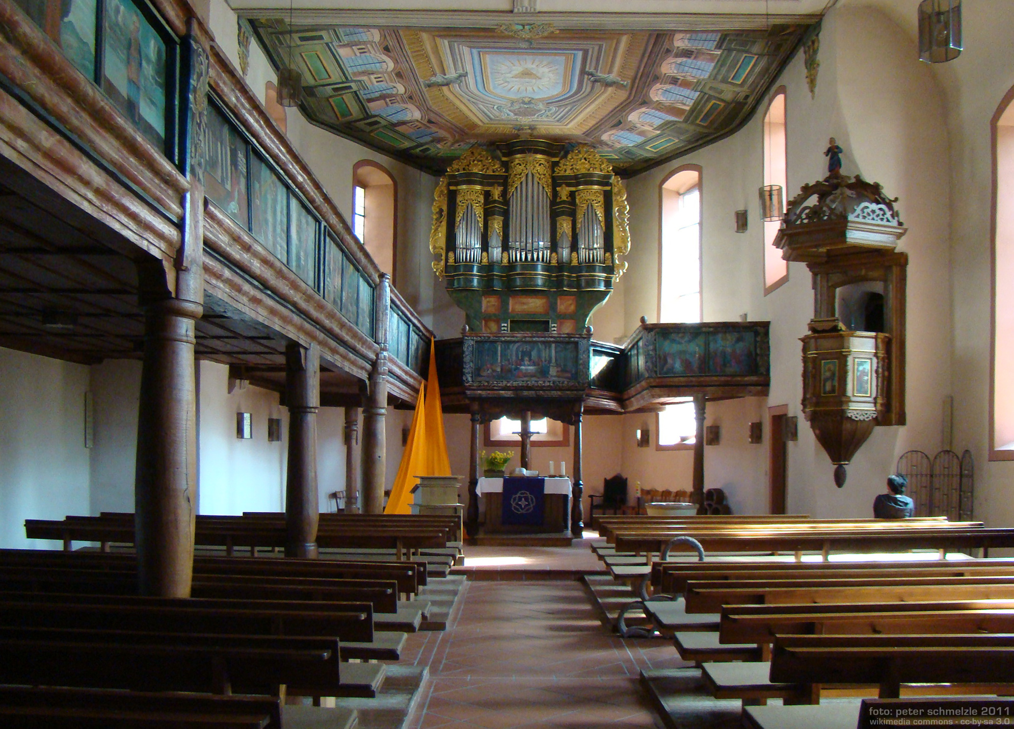 Kreuzkirche in Bretten, Innenansicht